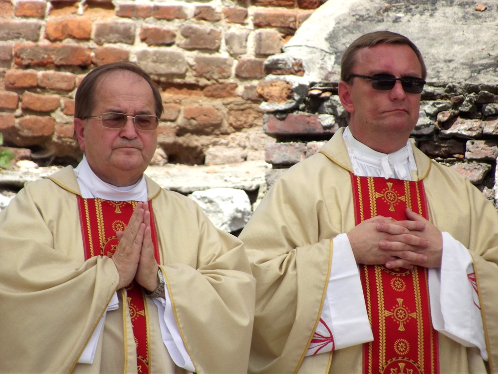 Zdjęcie zrobione podczas marszu w obronie TV Trwam oraz mediów katolickich w Krakowie.